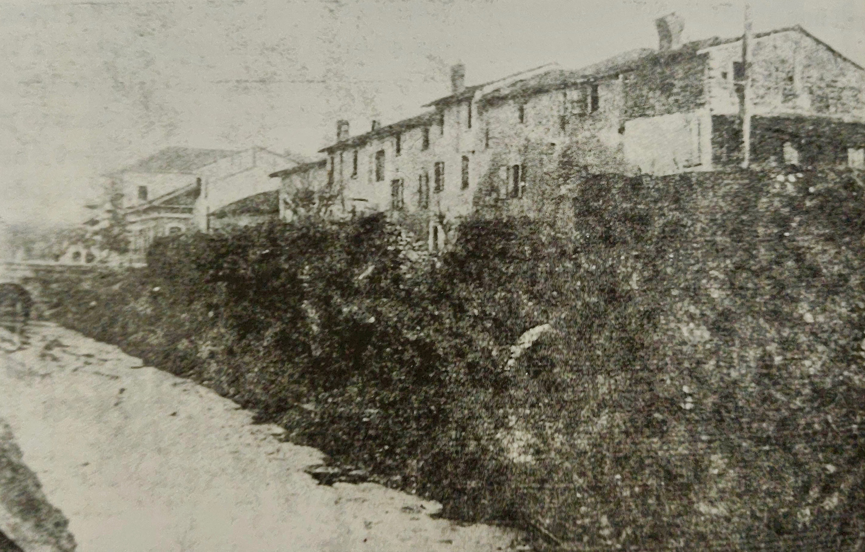 Una delle ultime immagini che ritraggono il fossato delle mura settentrionali, in seguito abbattute per la costruzione delle nuove scuole elementari